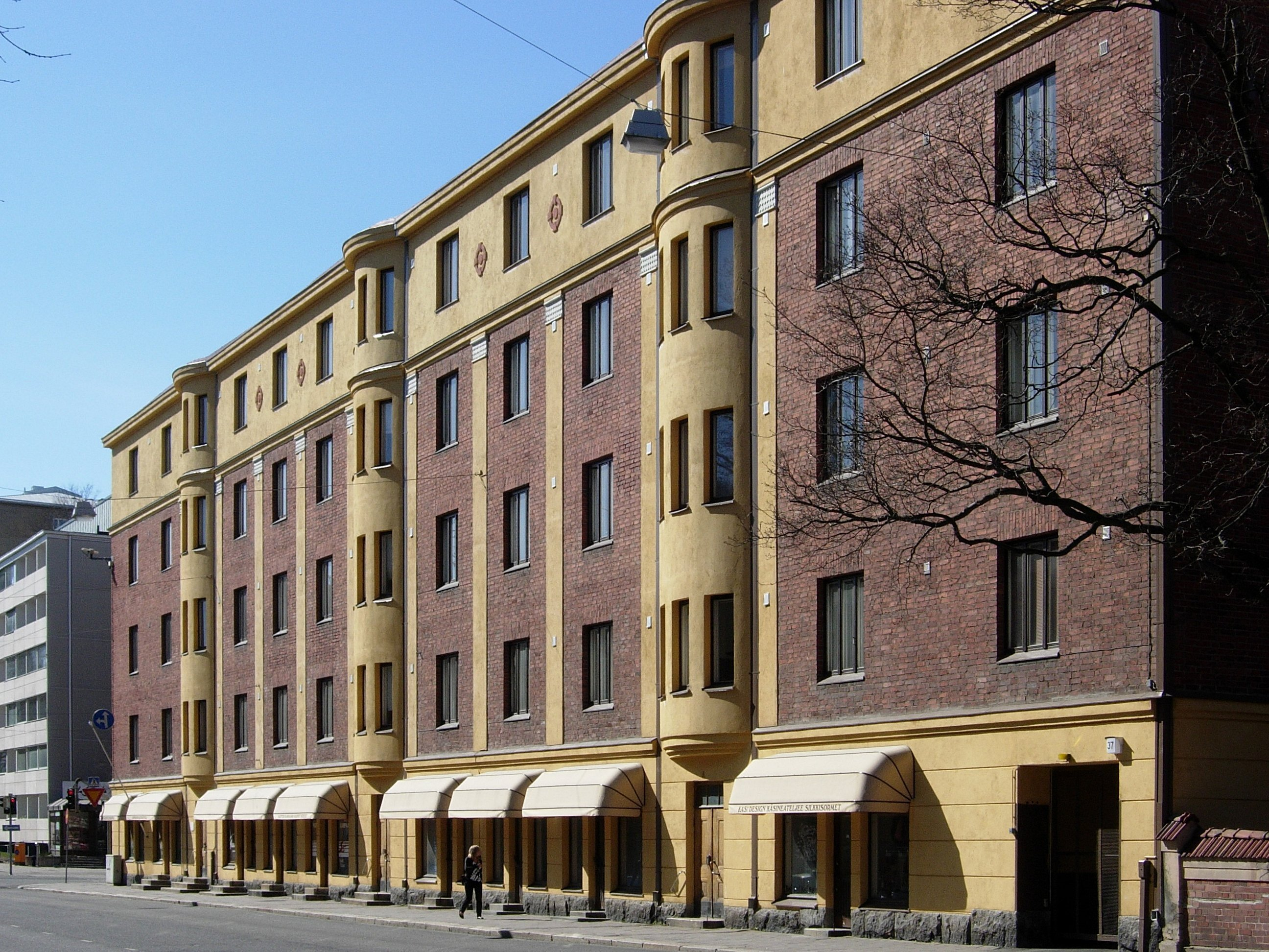 As Oy Eerikinkatu 37. Talo on viisikerroksinen klassistinen kivitalo ja se on rakennettu 1924–1925. Rakennuksen massiivitiiliseinien päällä on pääosin rappausta, osa on puhtaaksi muurattu.